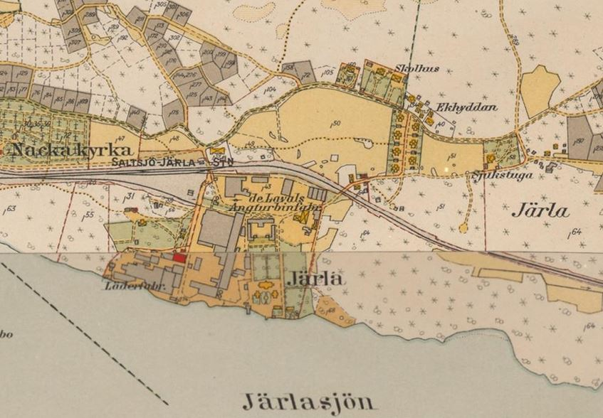 Järla gård och omgivning på detaljerad karta över Stockholm med omnejd. Upprättad mellan 1917 och 1934.